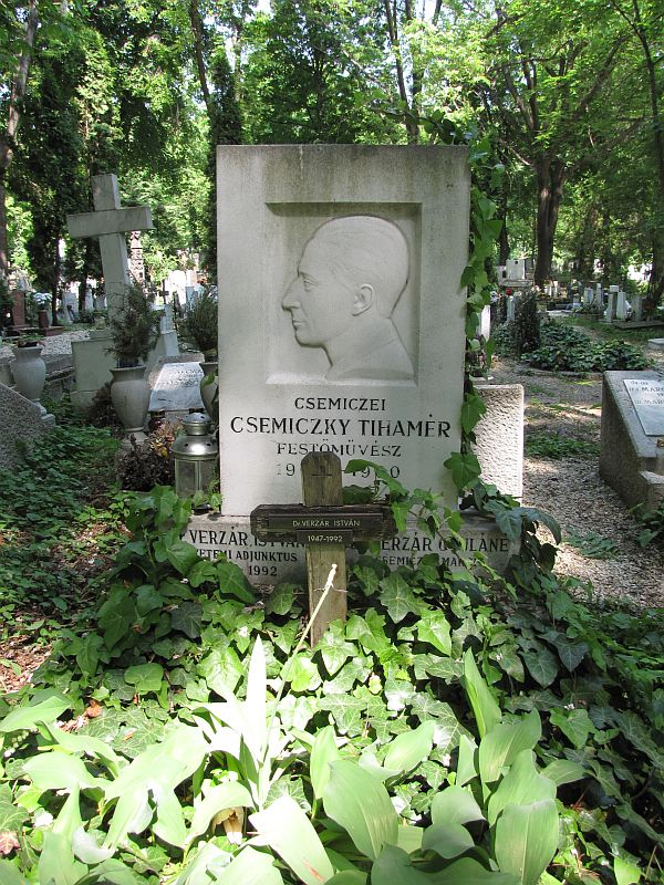 Csemiczky Tihamér (Törtel, 1904. március 19.–Budapest, 1960. augusztus 9.) festő, tervezőgrafikus sírja Budapesten. Farkasréti temető: 1/1-1-25